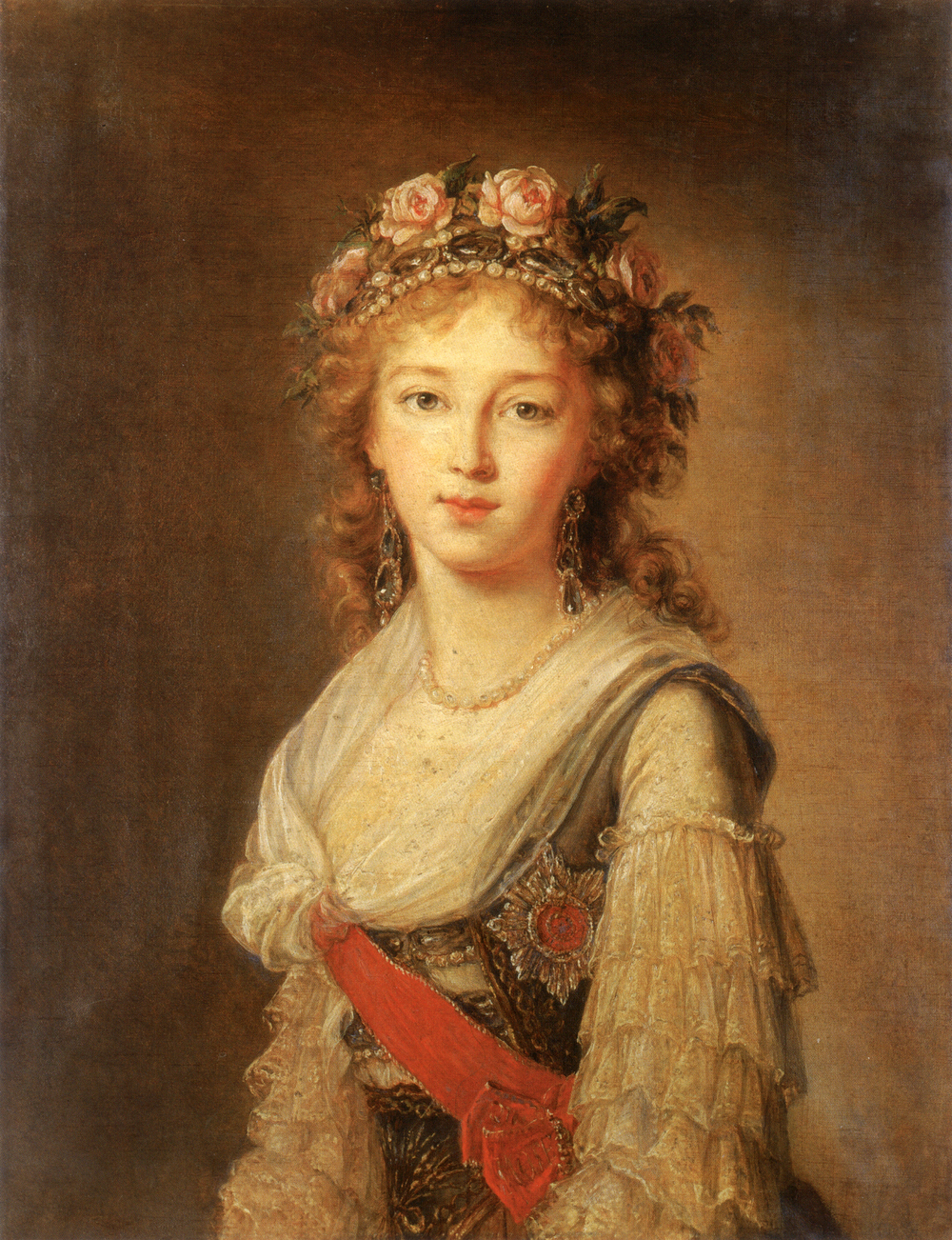 Портрет великой княгини Елизаветы Алексеевны (1779-1826). Неизвестный художник последней четверти XVIII века.1795 год. ГМЗ Царское Село